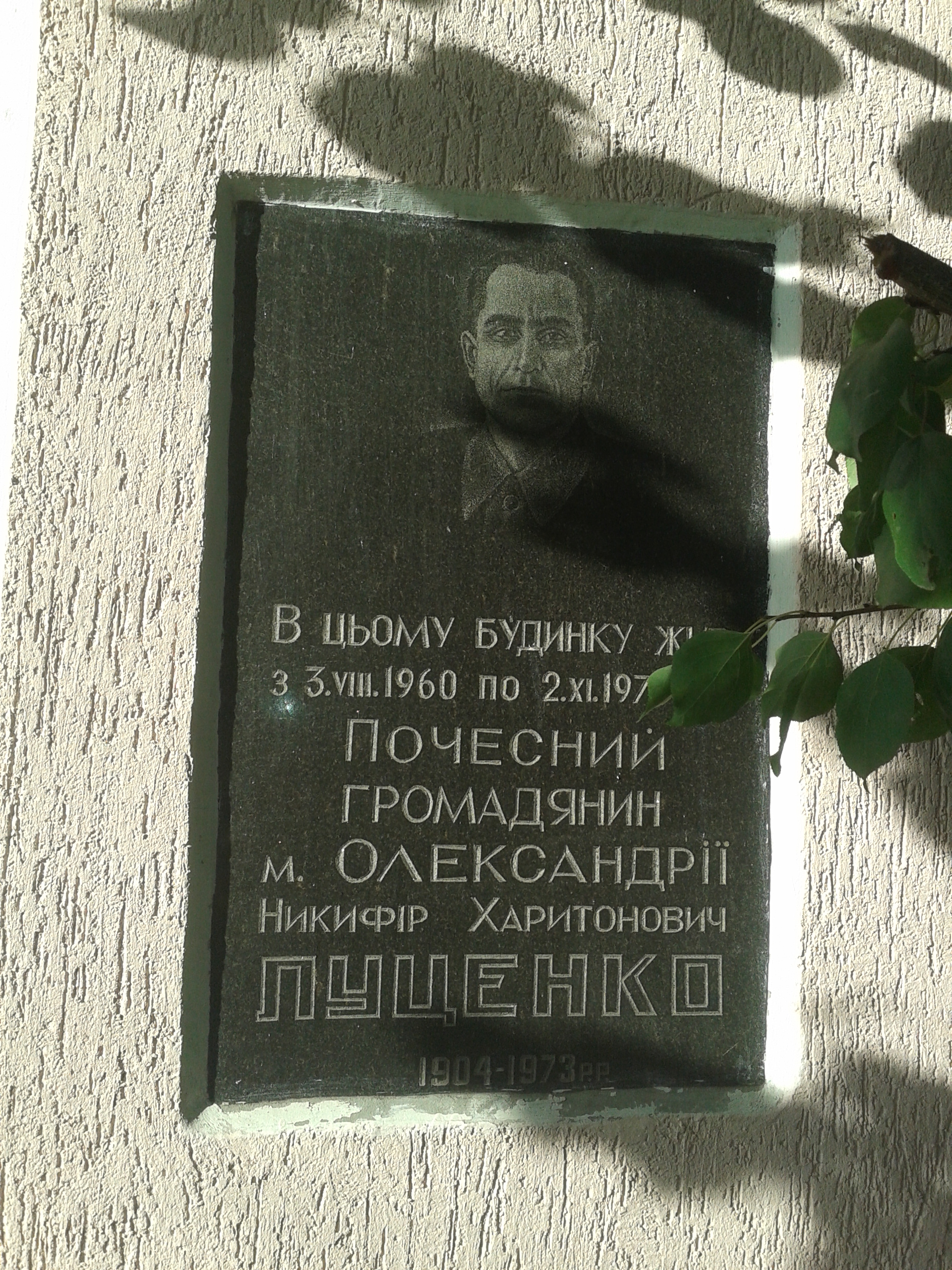 Будинок, де жив Луценко Н.Х. — почесний громадянин міста Олександрія